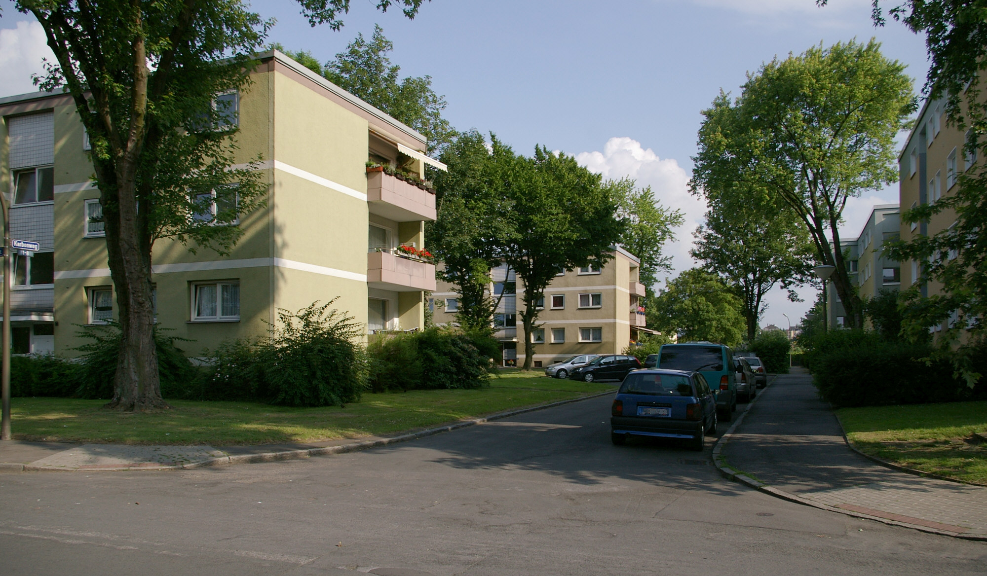 Siedlung in Dortmund-Schüren